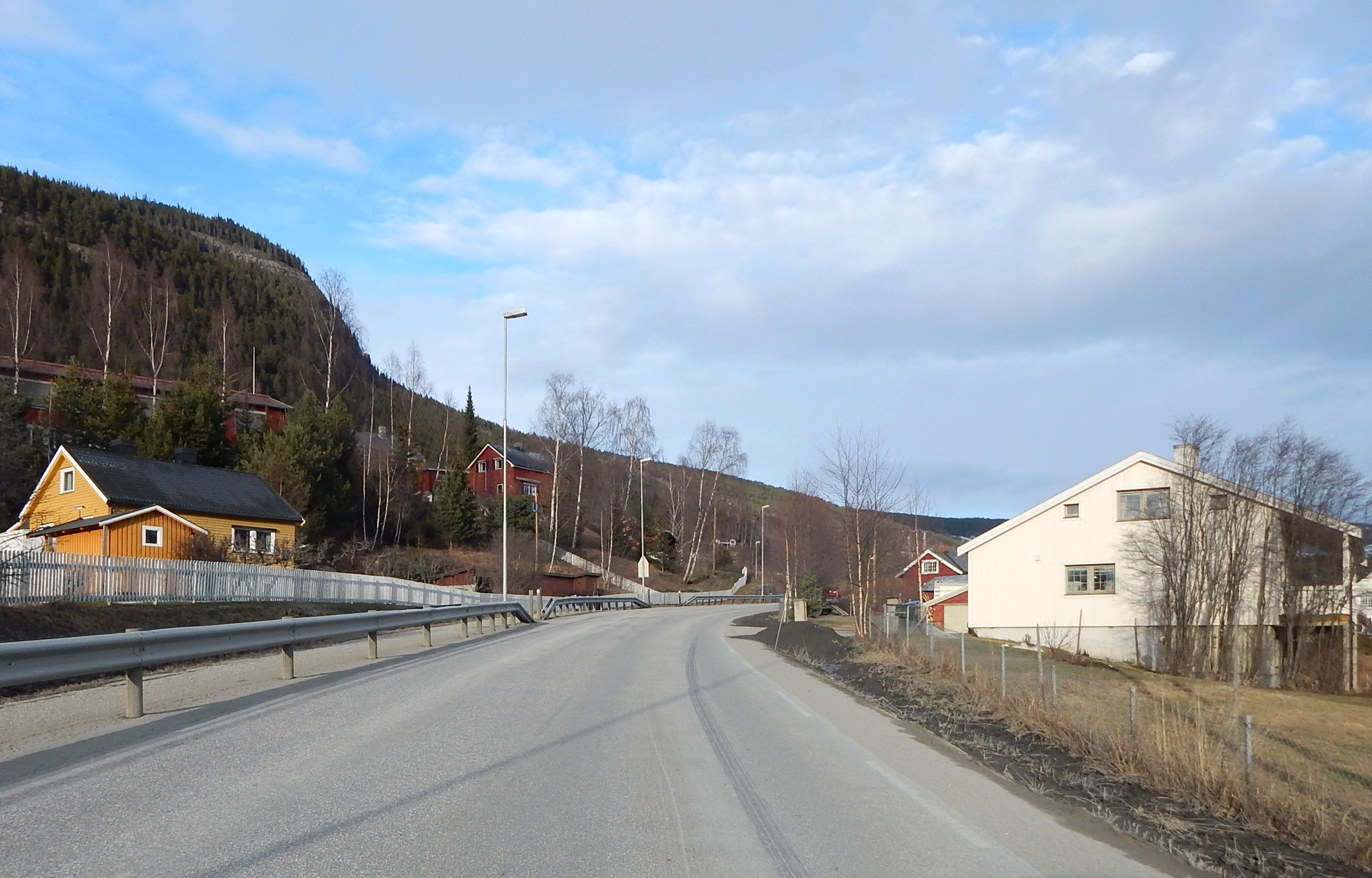 Gålåvegen (fylkesvei 401) på Harpefoss